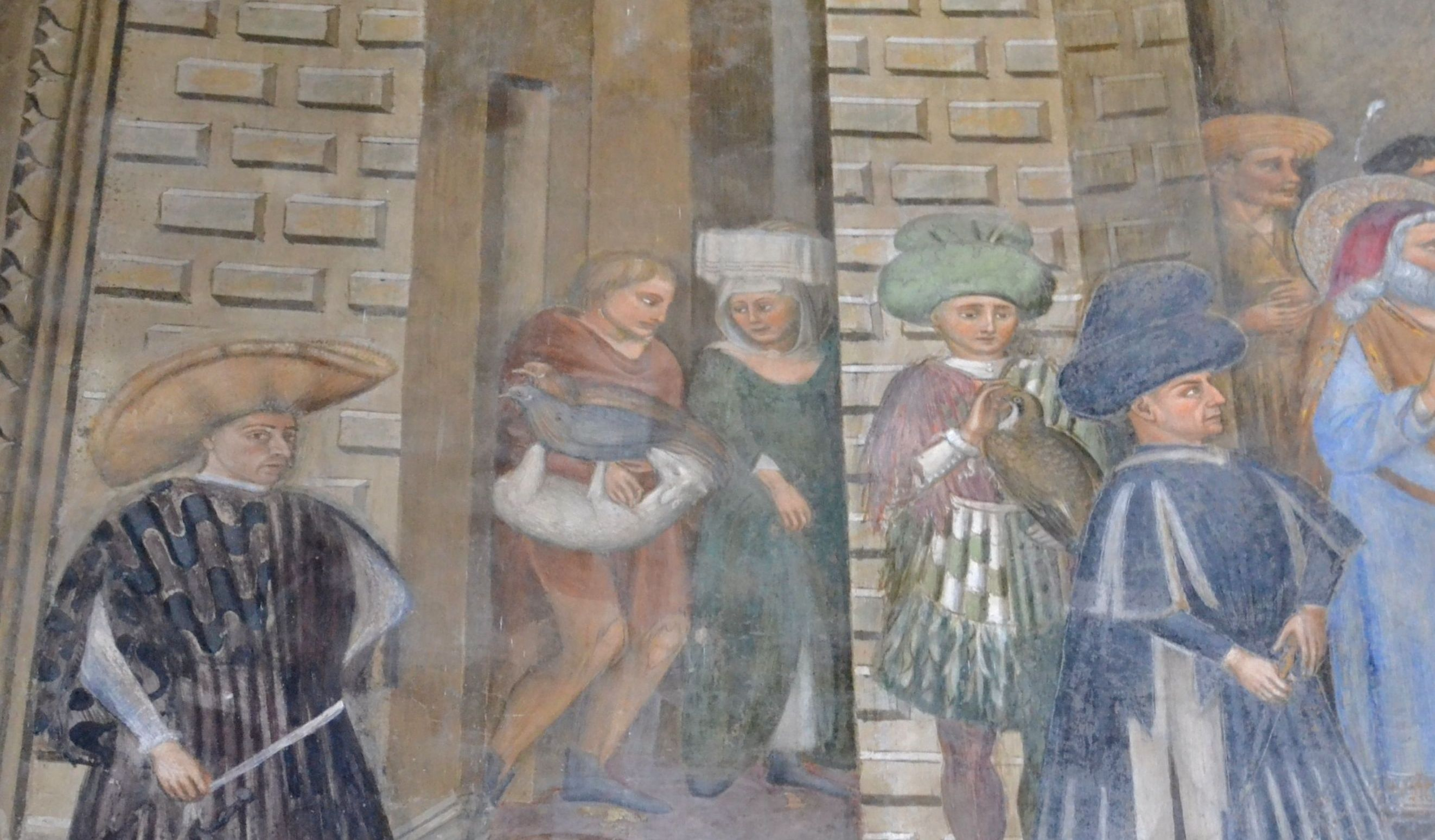 Ritratto di Leonardo da Besozzo (a sinistra) e Sergianni Caracciolo (a destra) nella scena della Natività della Vergine della cappella Caracciolo del Sole della chiesa di San Giovanni a Carbonara di Napoli